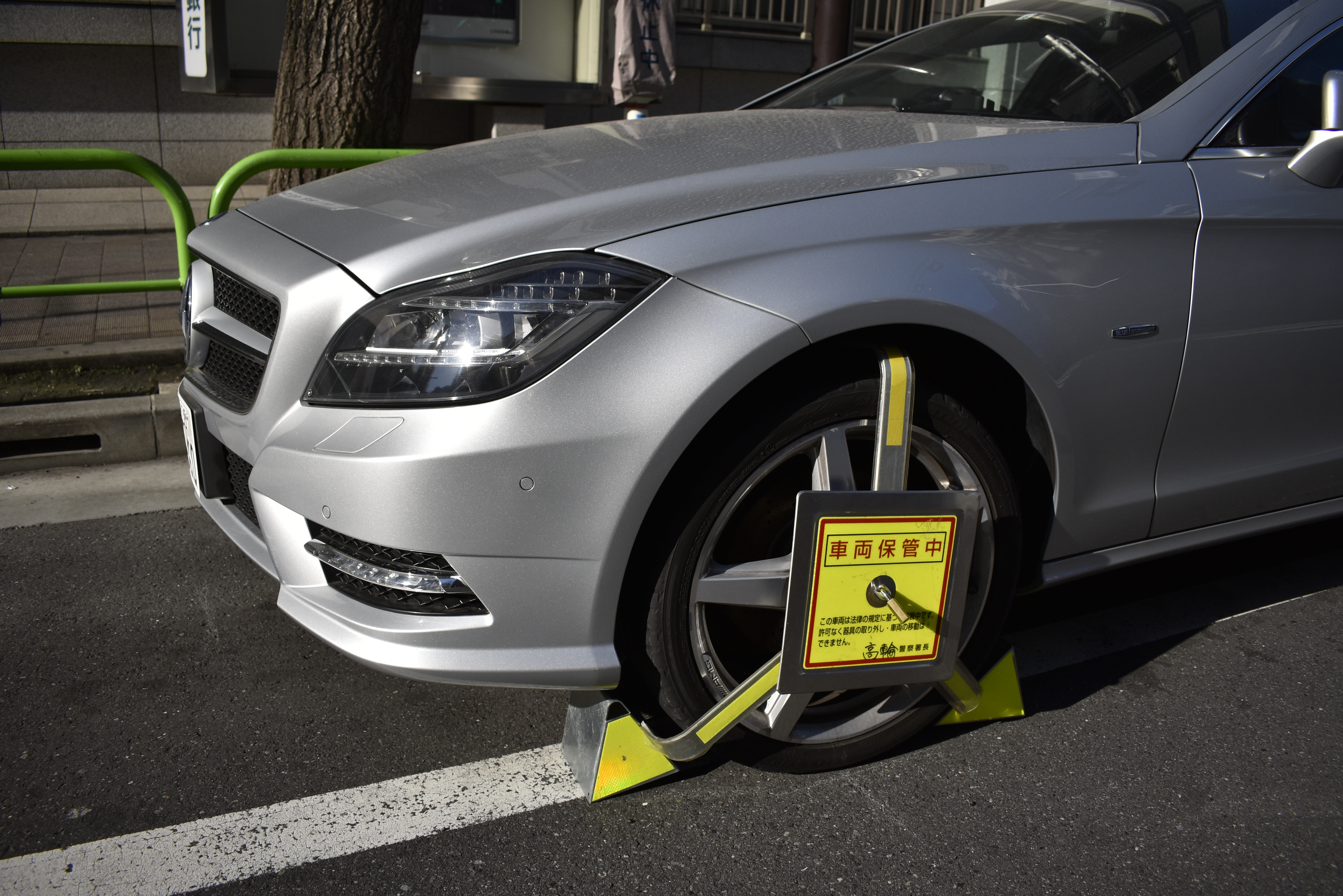 駐車違反の車輪止め